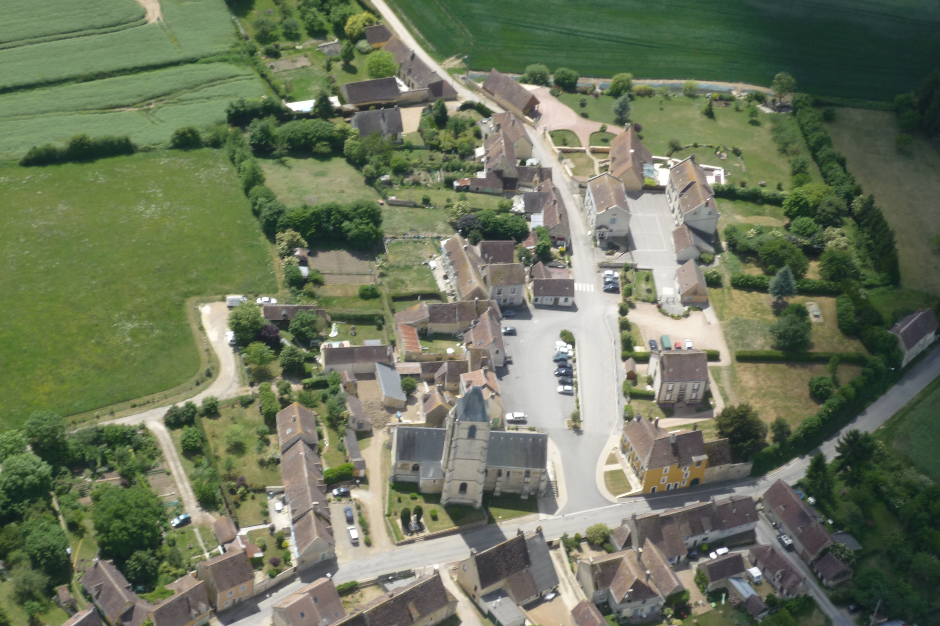 Vue aérienne de la commune de Mâle